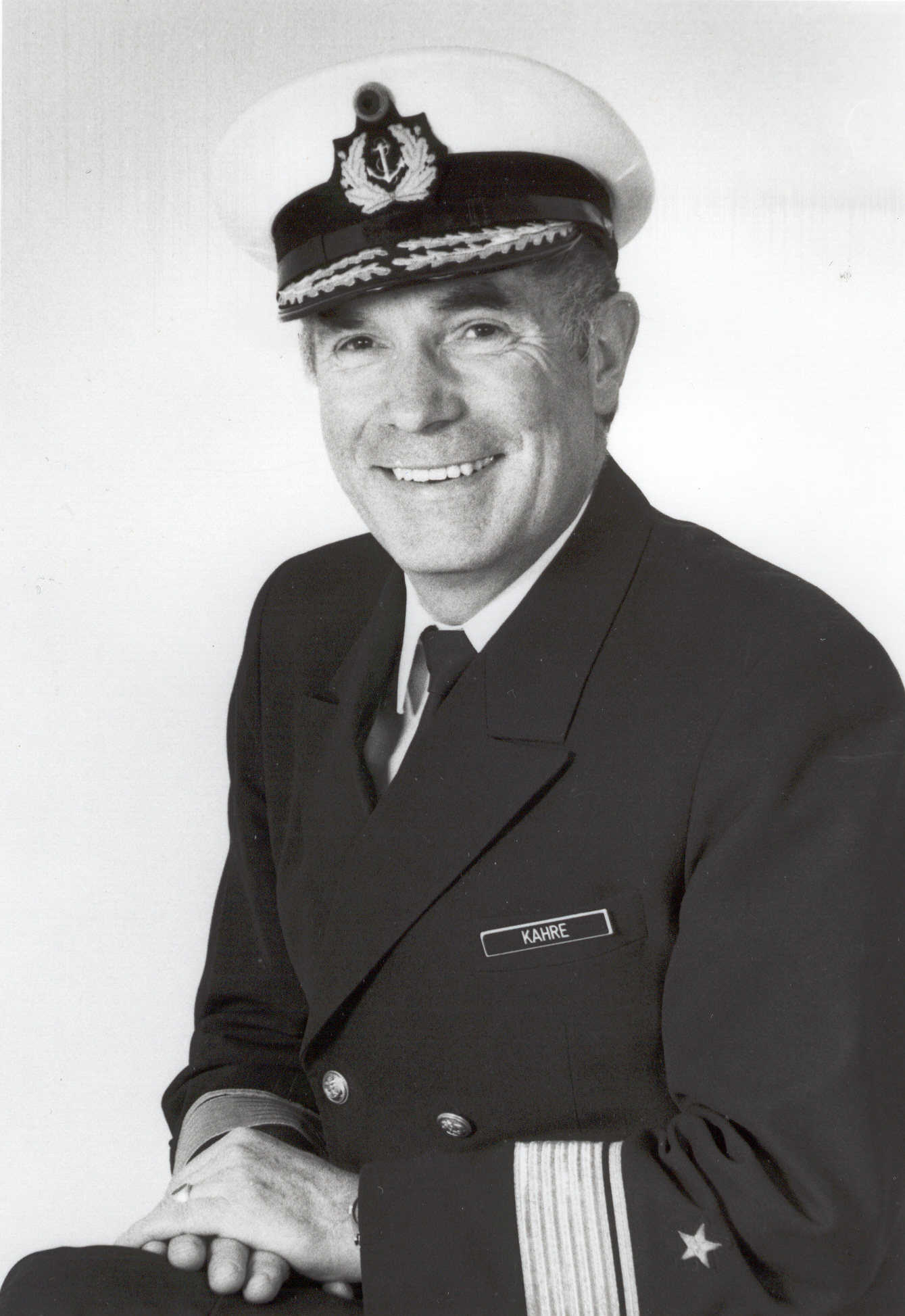 Porträtfotografie von Flottillenadmiral Uwe Kahre